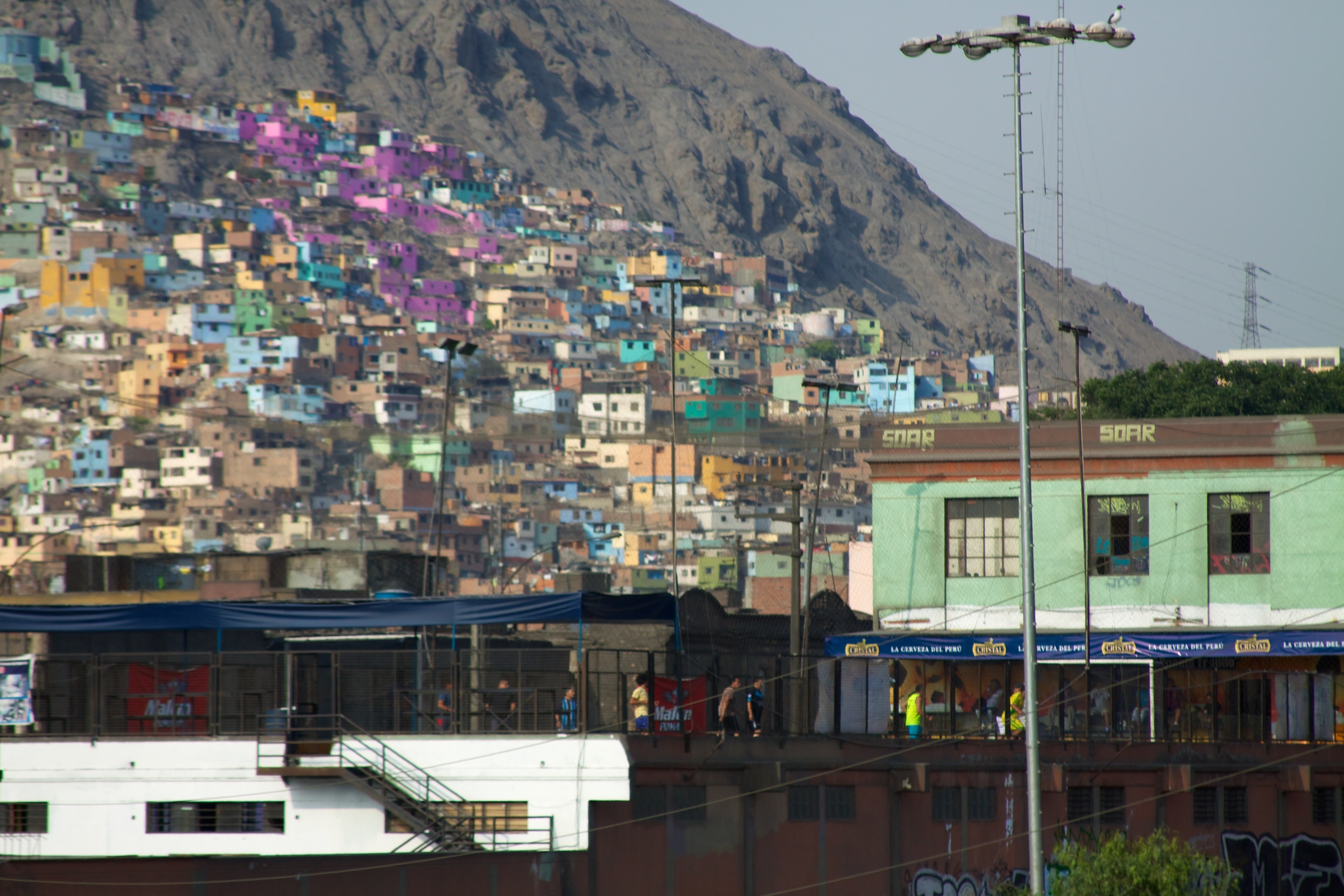 Asentamiento informal en Lima, Perú